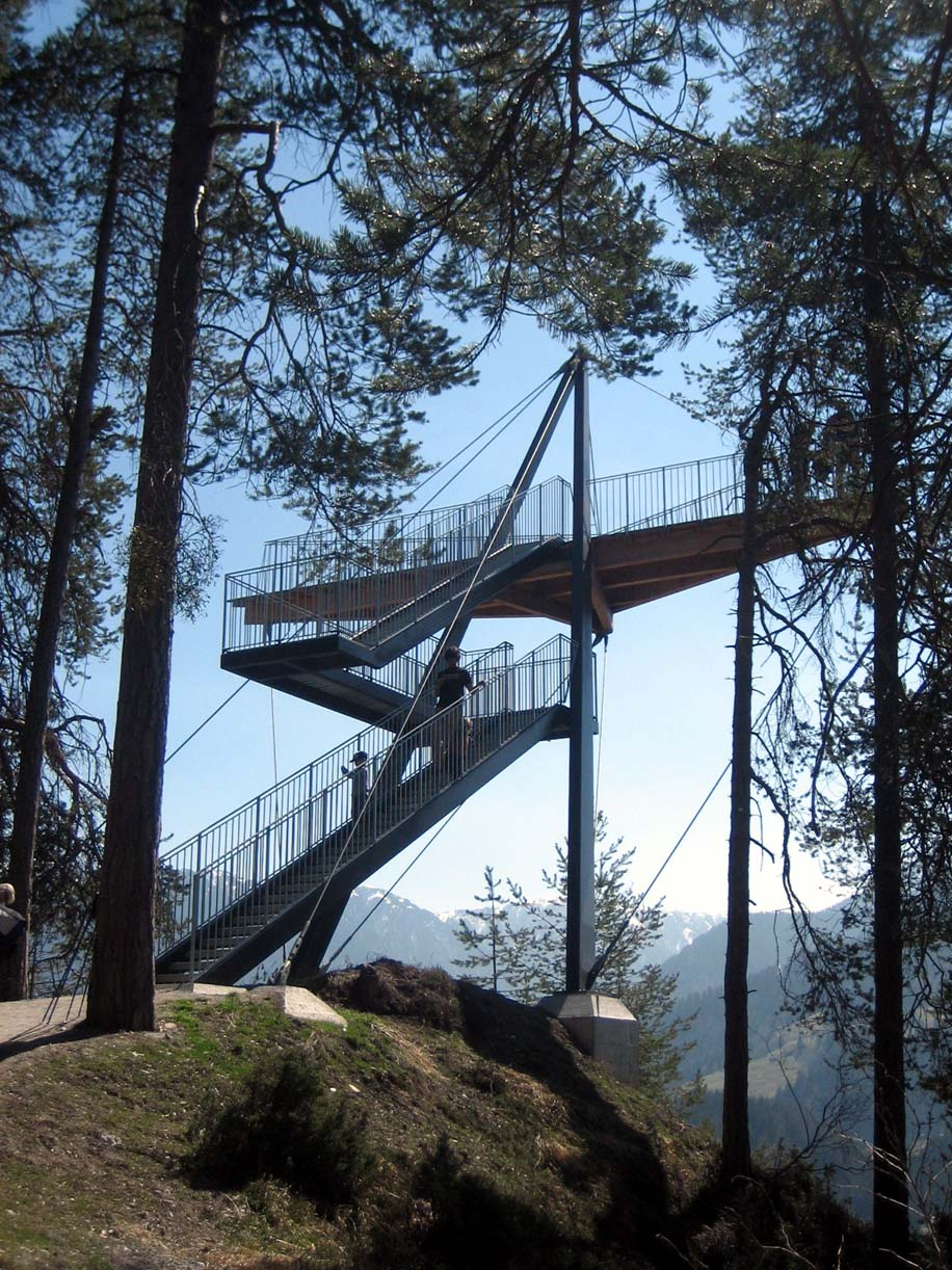 Aussichtsplattform 'Spir' bei Flims/Conn